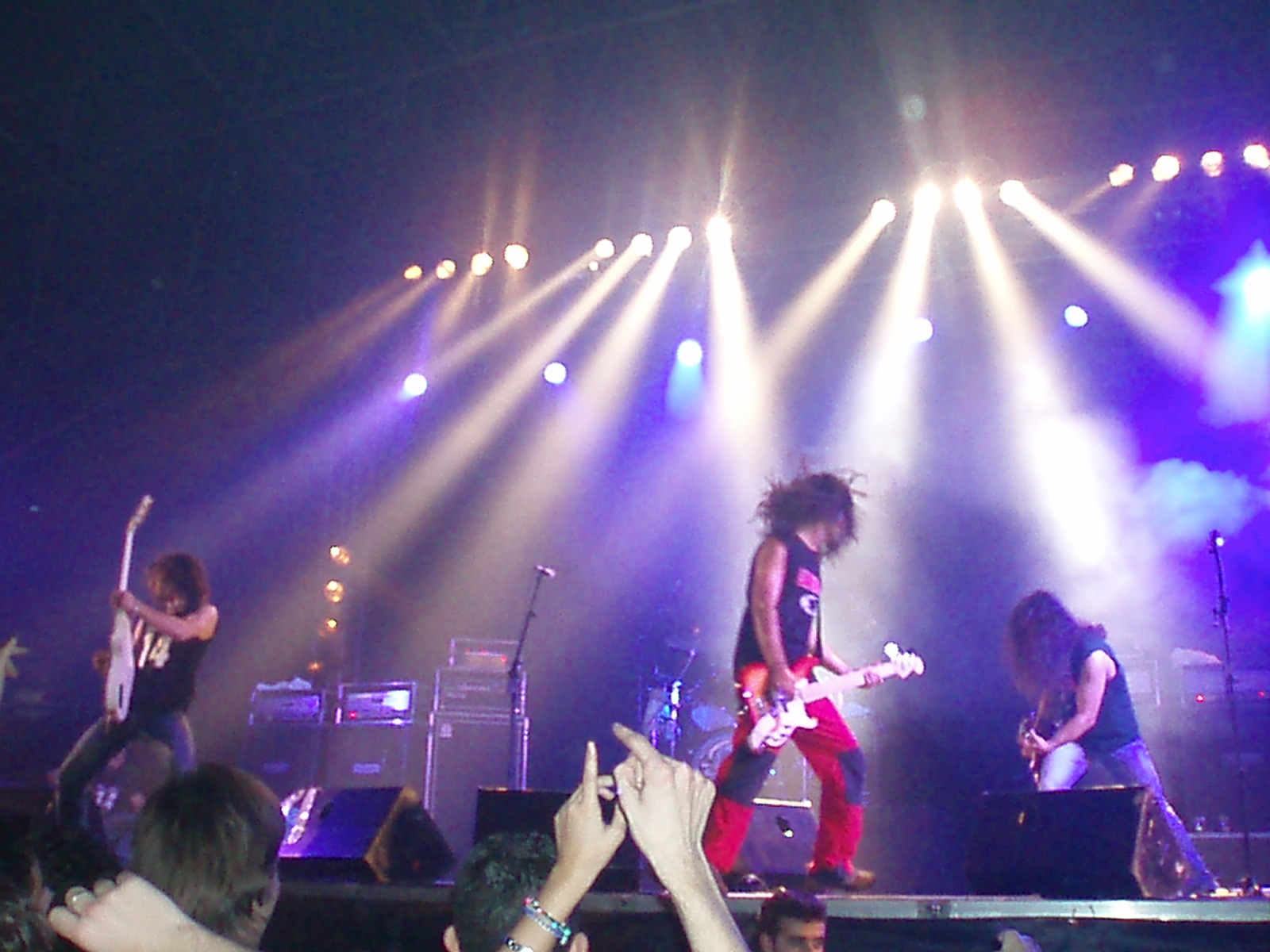 Concierto de La Fuga en el Multiusos Sánchez Paraíso (Salamanca). 27 de Octubre de 2006.